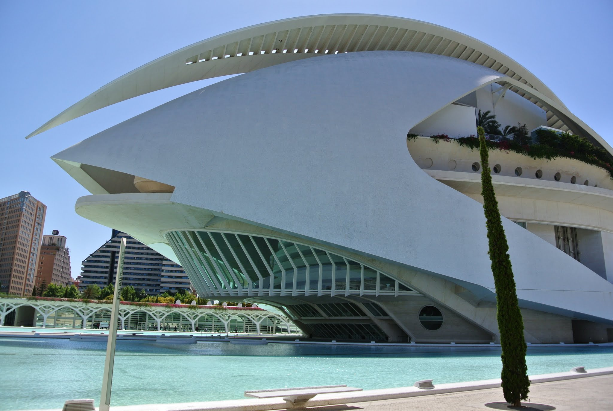 Ciutat de les Arts i les Ciències, València, Valencia, Spain